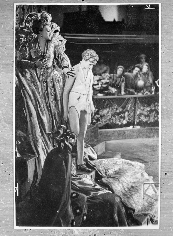 Otto Skall (Fotograf): Josephs Legende Wiener Staatsoper Fotolegende bei ÖNB: Maria Eis (ganze Figur stehend, Rechtsprofil )als 'Potiphars Weib' zusammen mit Karl Raimund (ganze Figur stehend, fast Rechtsprofil; Blick gesenkt) als 'Joseph' in der Ballettaufführung an der Wiener Staatsoper, Inszenierung und Einstudierung: Margarete Wallmann, Choreografie: Heinrich Kröller.